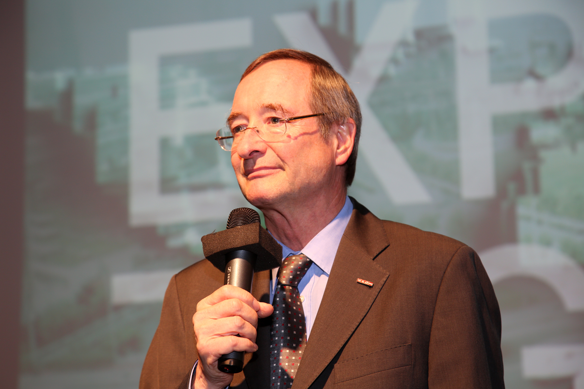 Leitl_Christoph-3196